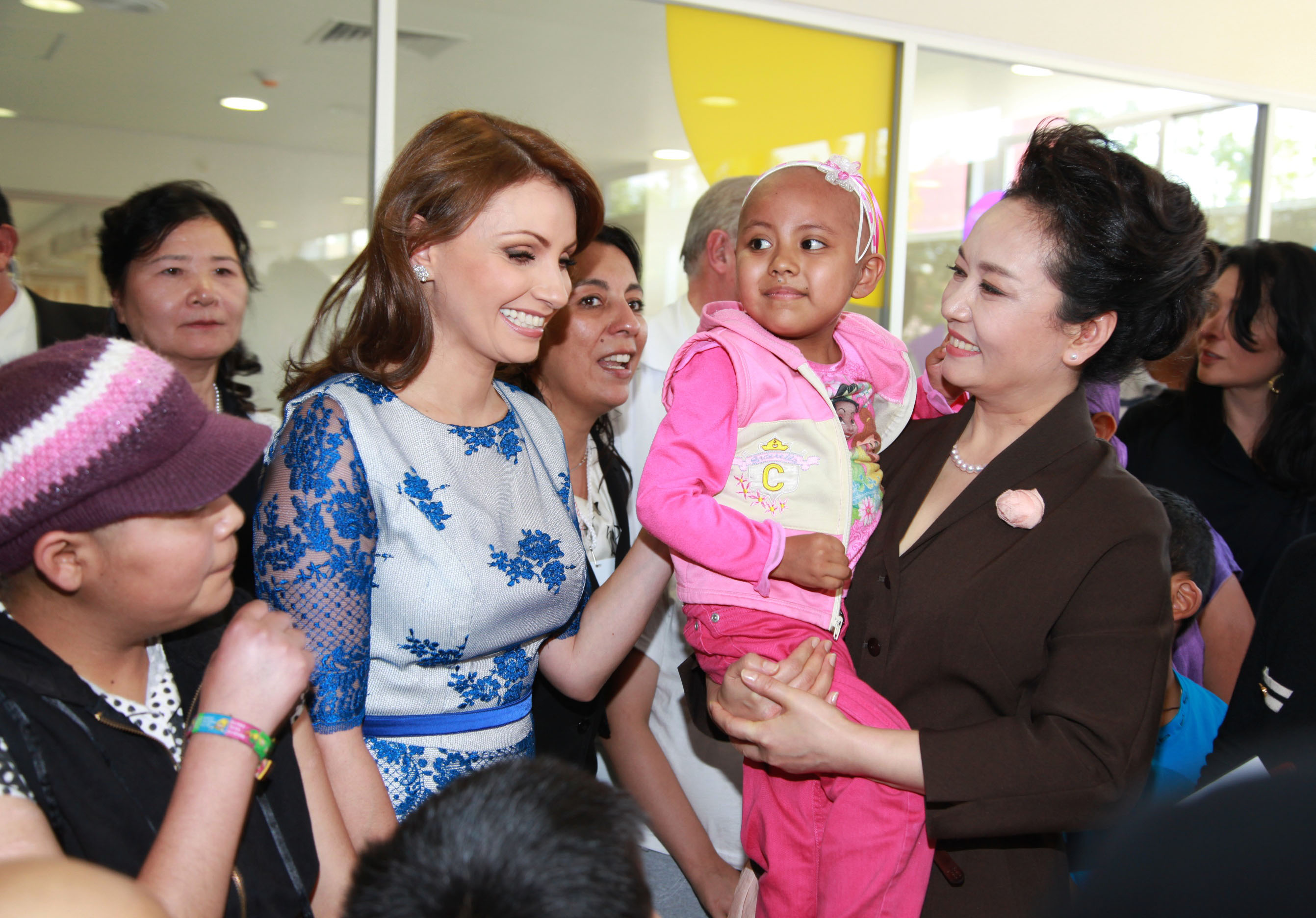 Recorrido por el Hospital Infantil de México Federico Gómez. Hospital Infantil de México Federico Gómez, Ciudad de México. 4 de junio de 2013.